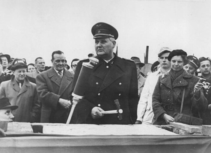 Zentralbild Höhne-Pohl 2 Motive-10.4.1954 Grundstein für die Hochschule für Verkehrswesen gelegt In Dresden wurde am 8.4.1954 der Grundstein für die Hochschule für Verkehrswesen gelegt. In mehreren Bauabschnitten soll bis 1957 diese neue Hochschule für 2 500 Studenten bezugsfertig sein. UBz: Der Minister für Eisenbahnwesen der Deutschen Demokratischen Republik, Roman Chwalek, bei der Grundsteinlegung, (links davon) Nationalpreisträger Professor Paulick, der den Entwurf für die neue Hochschule anfertigte.